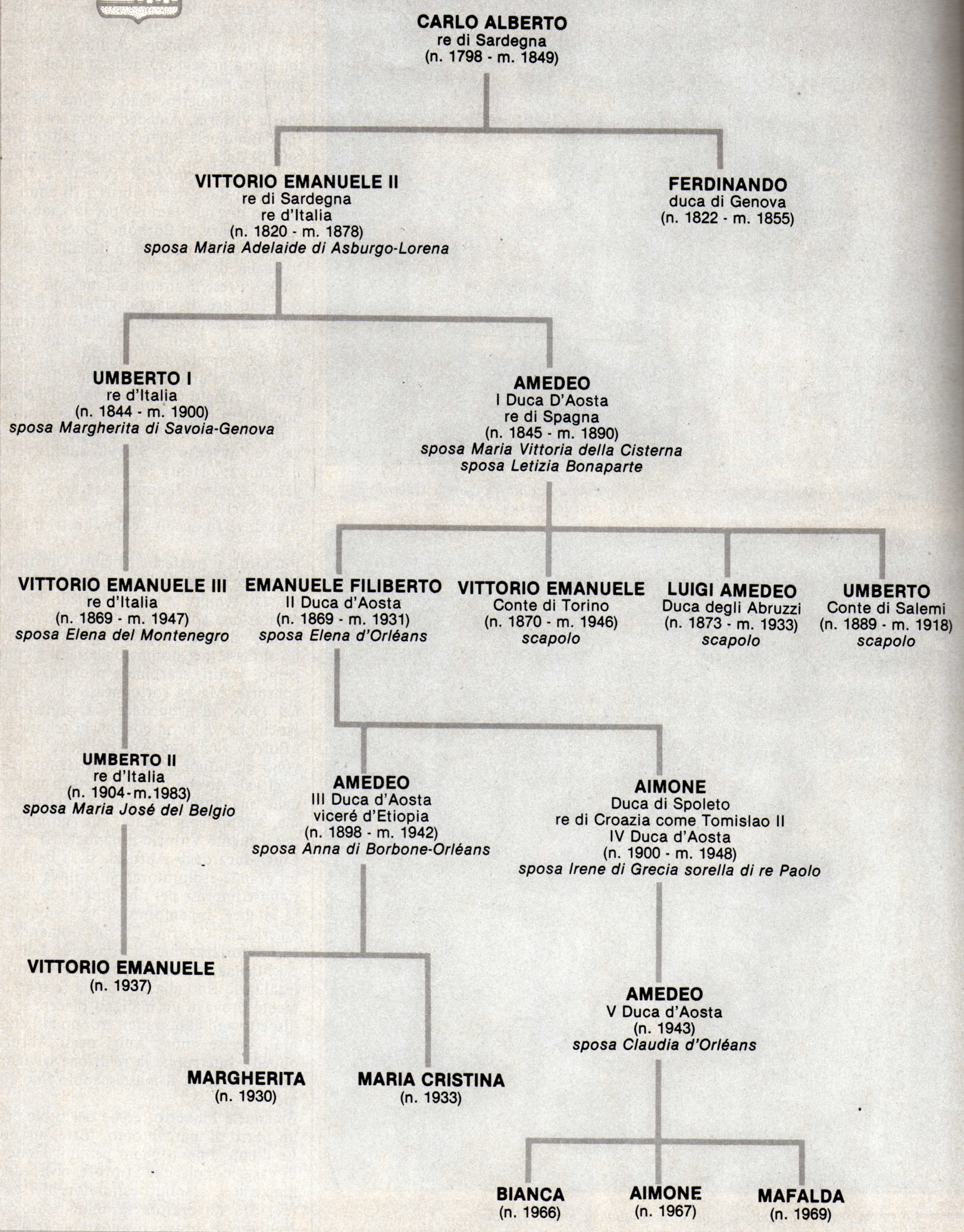 Albero genealogico dei Savoia Aosta